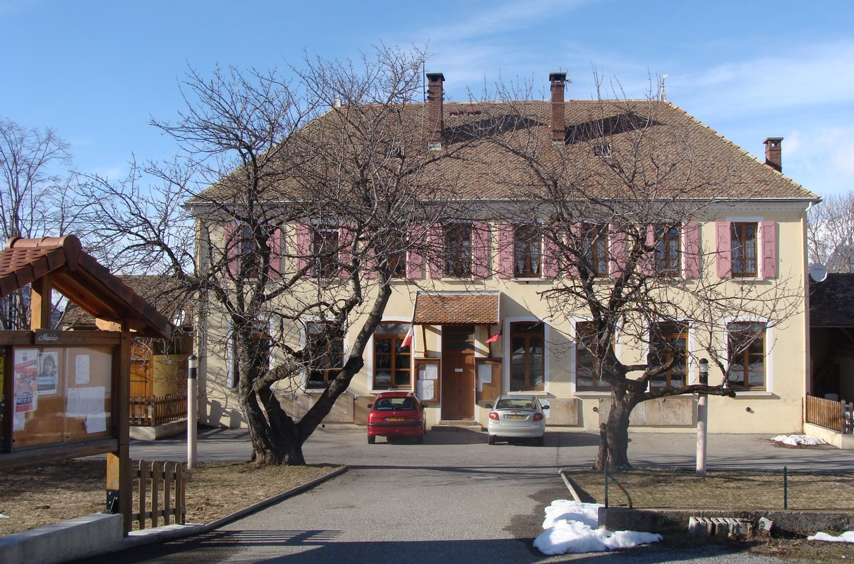 La mairie de Saint-Eusèbe-en-Champsaur (Hautes-Alpes).